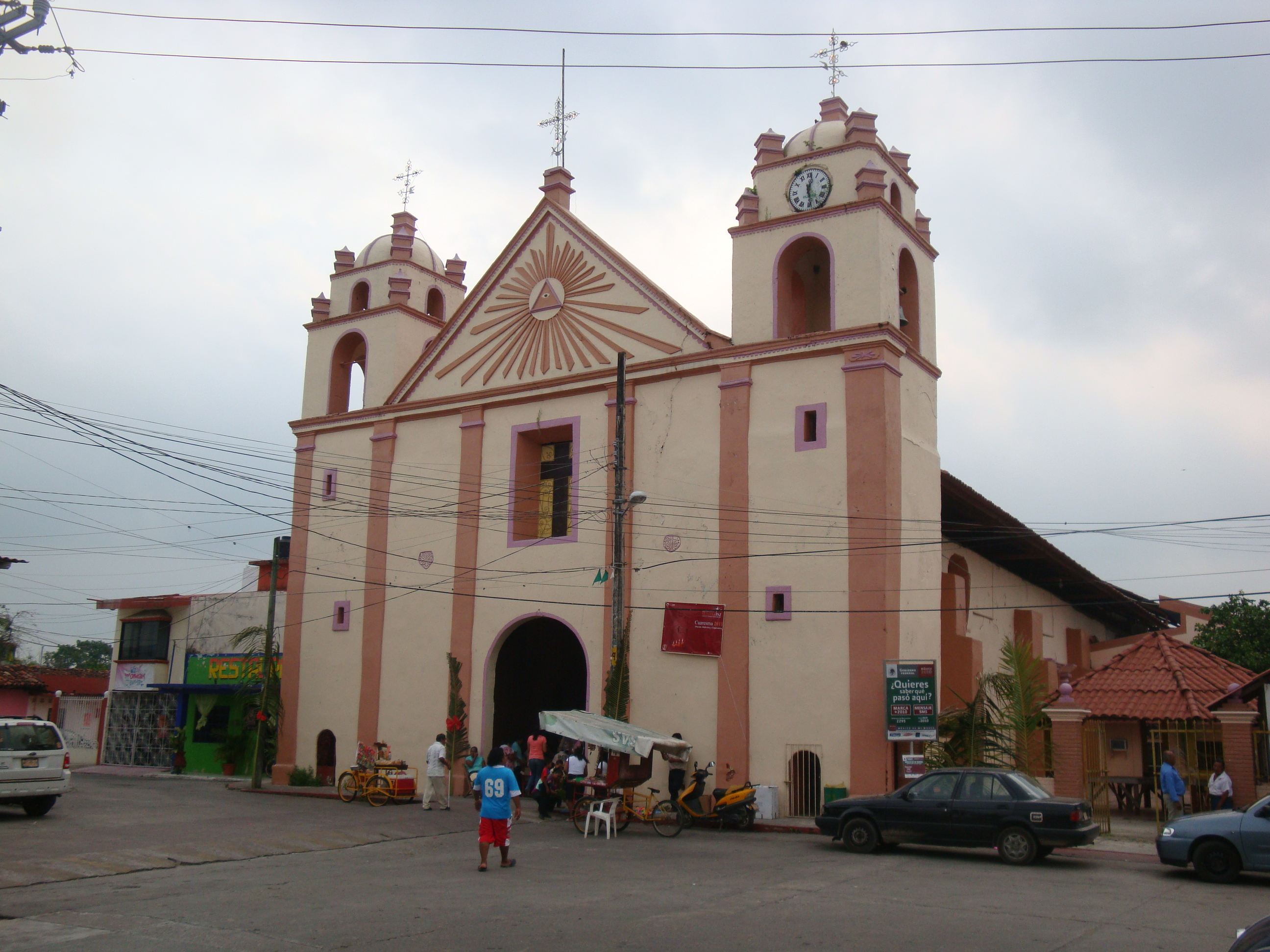 Templo de Nuestra Señora de la Asunción en la ciudad de Tacotalpa estado de Tabasco Méxco. En la actualidad esta iglesia es la más antigua de Tabasco ya que su construcción inició en 1703 y culminó en 1710 cuando Tacotalpa era la capital de la provincia colonial de Tabasco. Sobrevivió a las fuertes crecientes del río de La Sierra que destruyeron gran parte de la ciudad colonial y a la campaña antirreligiosa emprendida por el entonces gobernador Tomás Garrido Canabal